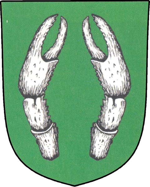 Znak obce Vohančice